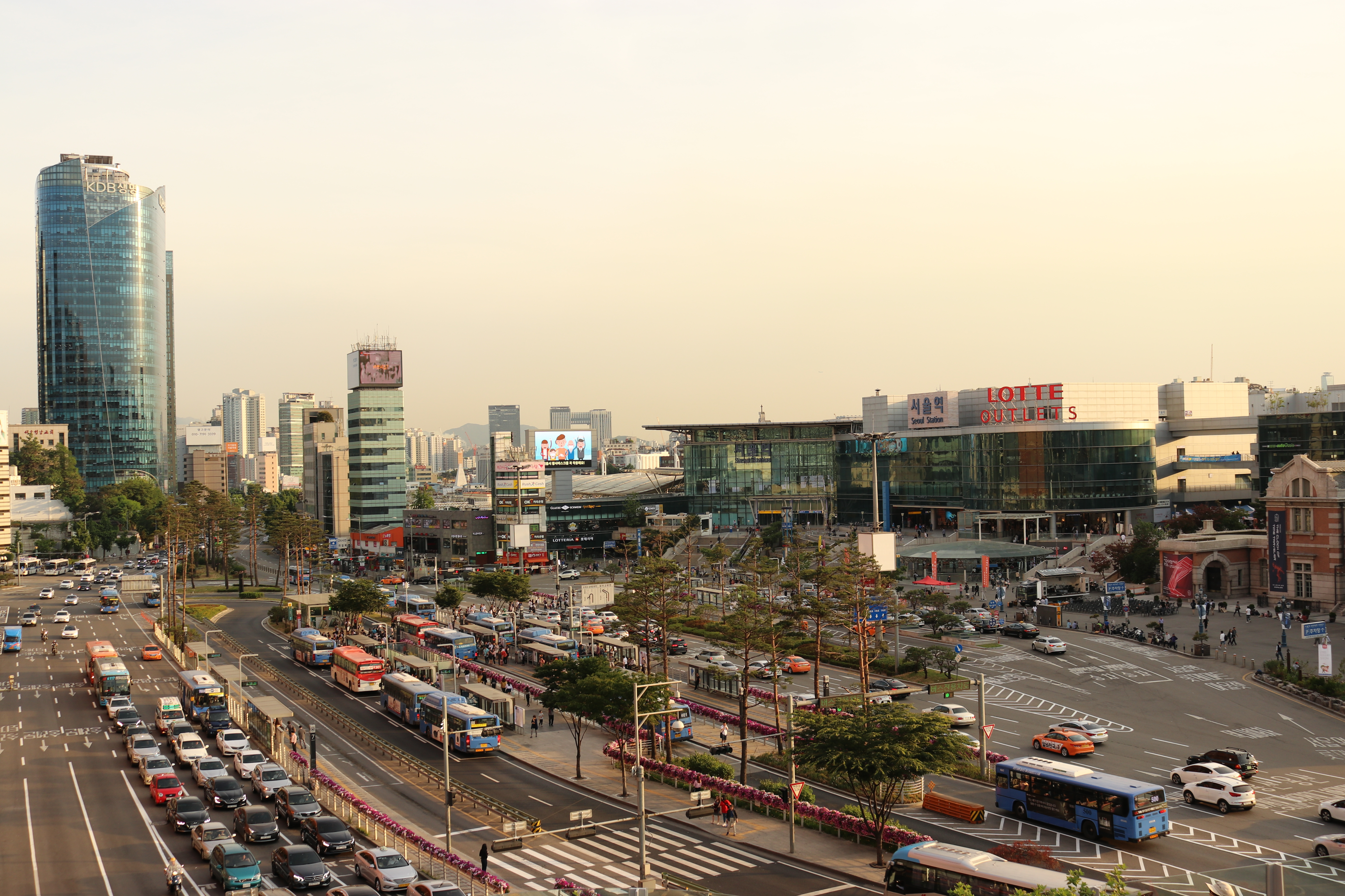 서울로 7017 에서 바라본 서울역